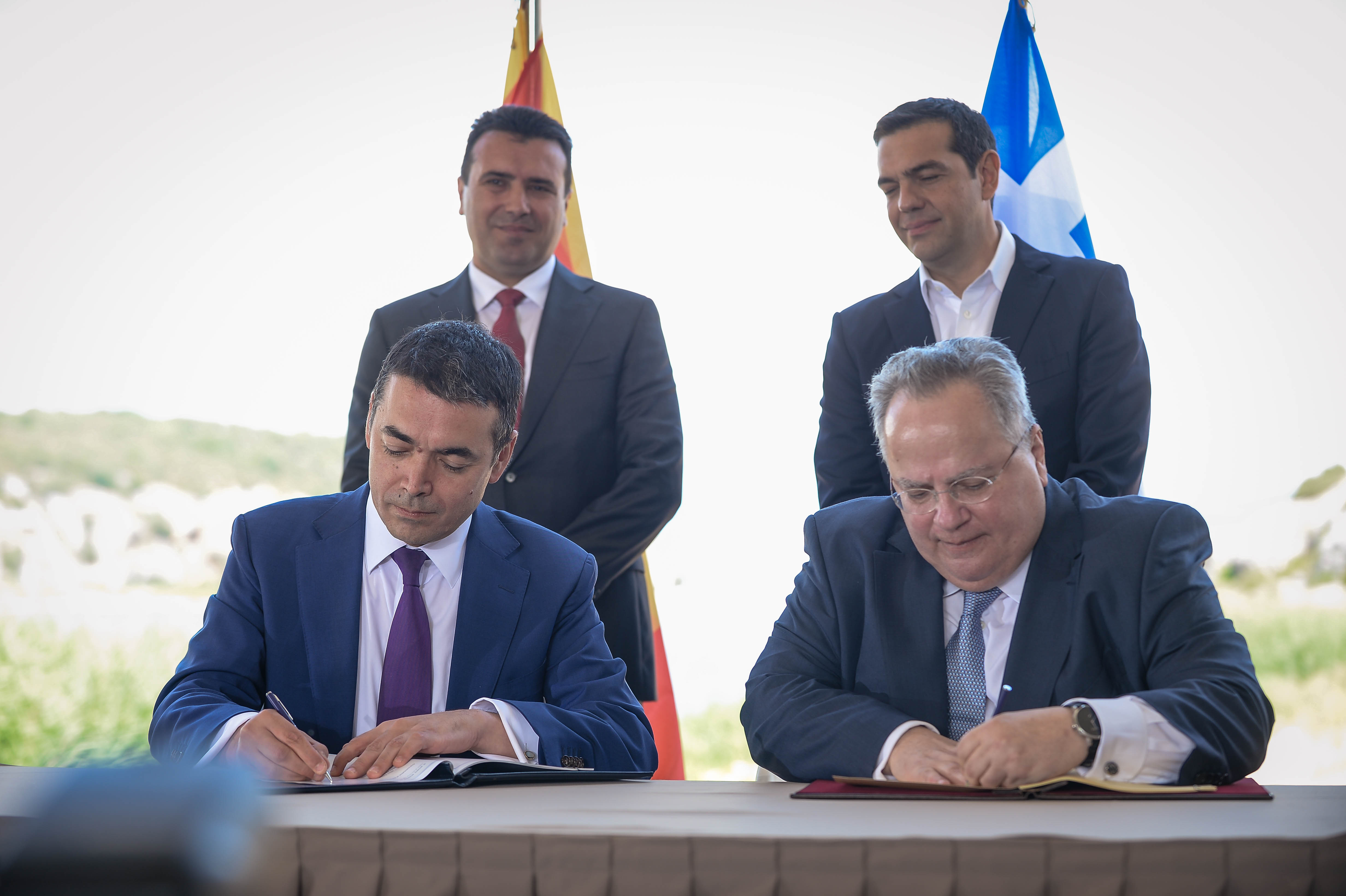 Потпишување на договорот за македонско-грчкиот спор [17.06.2018, Преспа]